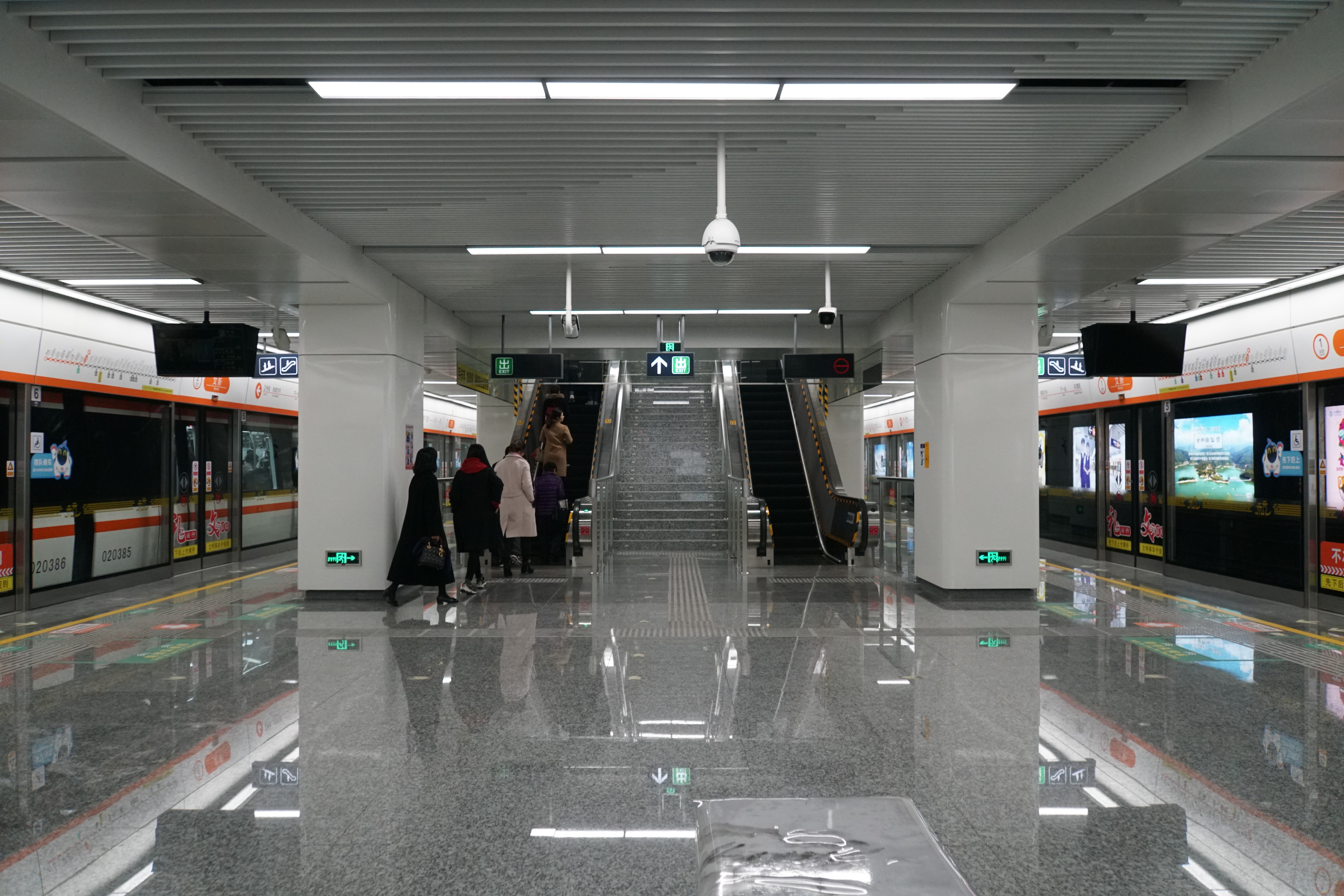 文新站站台